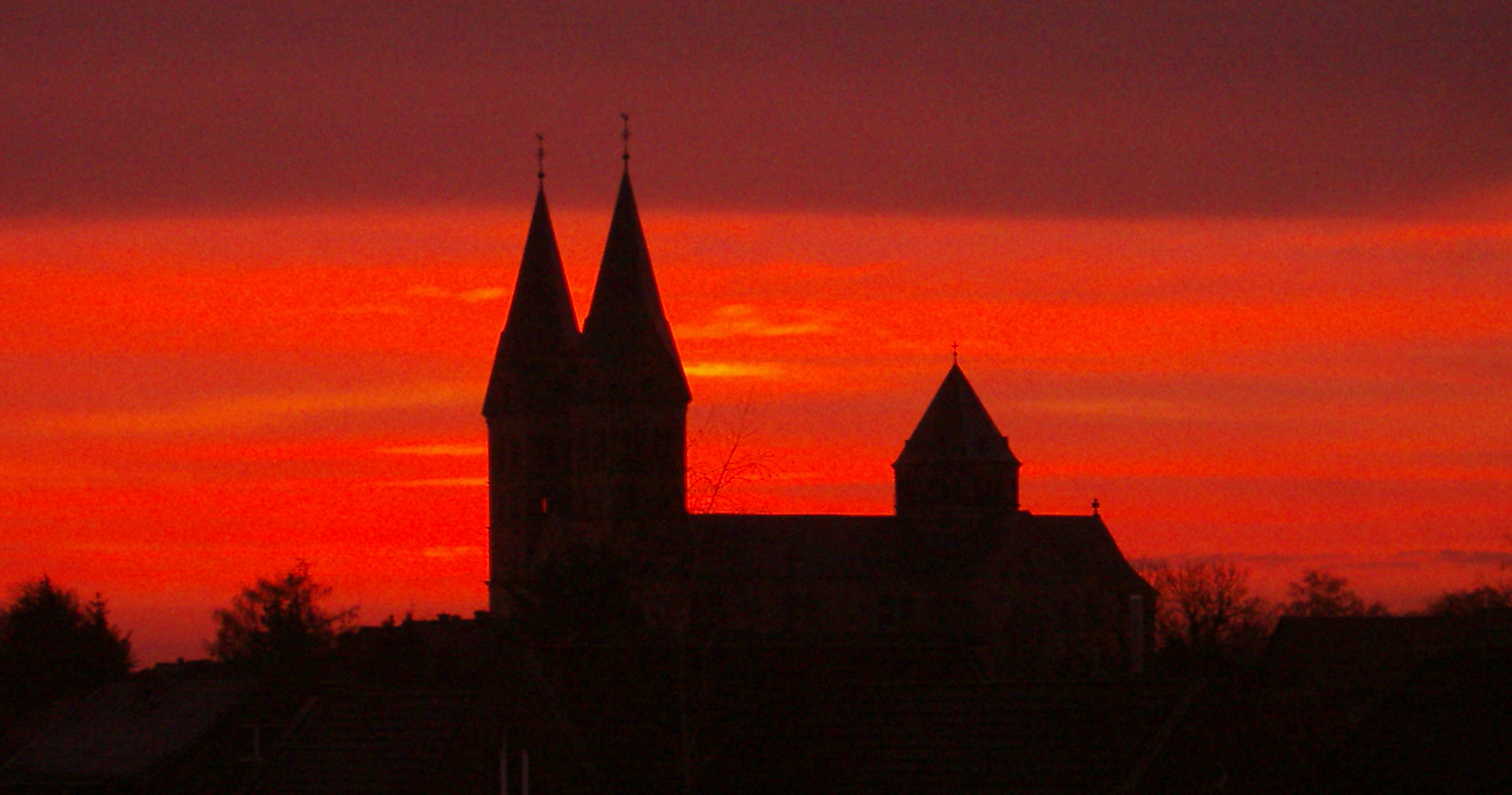 Katholische Kirche St. Anna in Neuenkirchen (Kreis Steinfurt) Kirchplatz 1. This is a photograph of an architectural monument. Koordinaten: 52*14'37N 7°22'19E Wahrzeichen der Gemeinde Neuenkirchen im Morgenrot, kurz vor Sonnenaufgang.